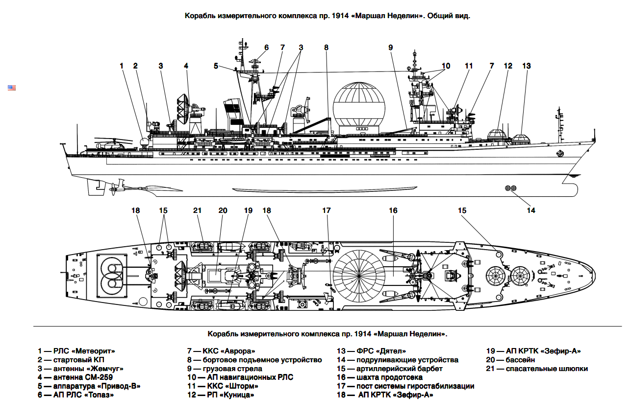 Корабль измерительного комплекса "Маршал Неделин". Общая схема